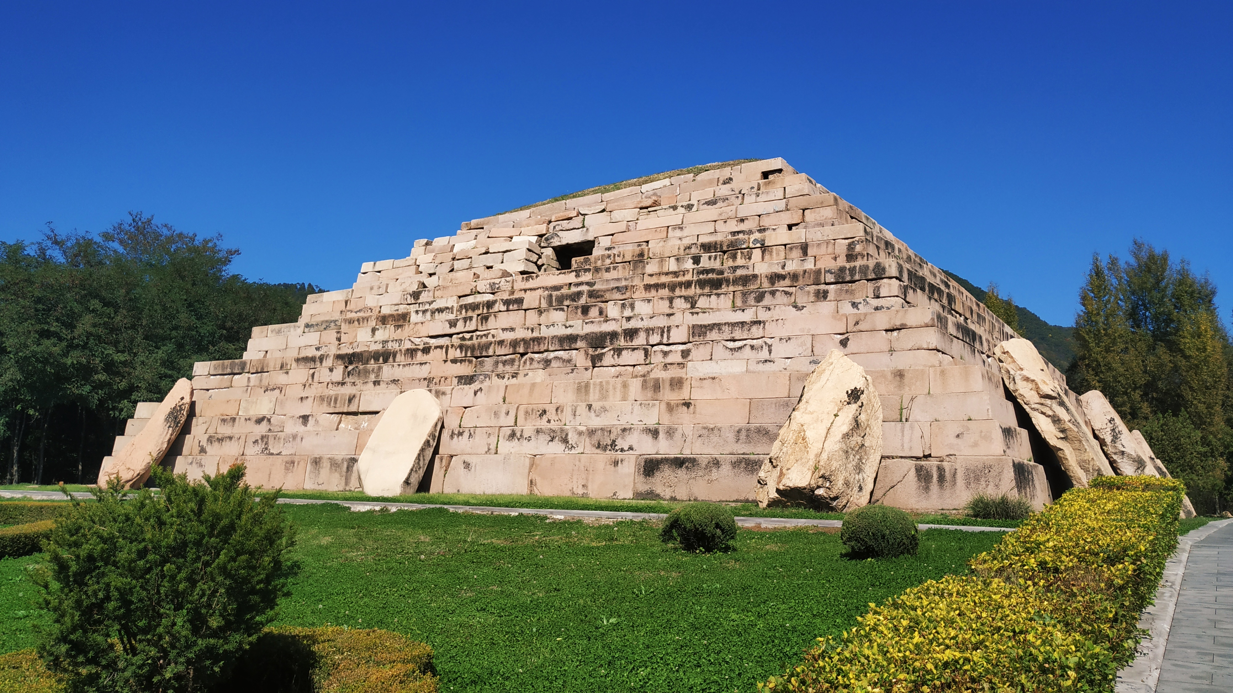 中文（中国大陆）: 将军坟南侧